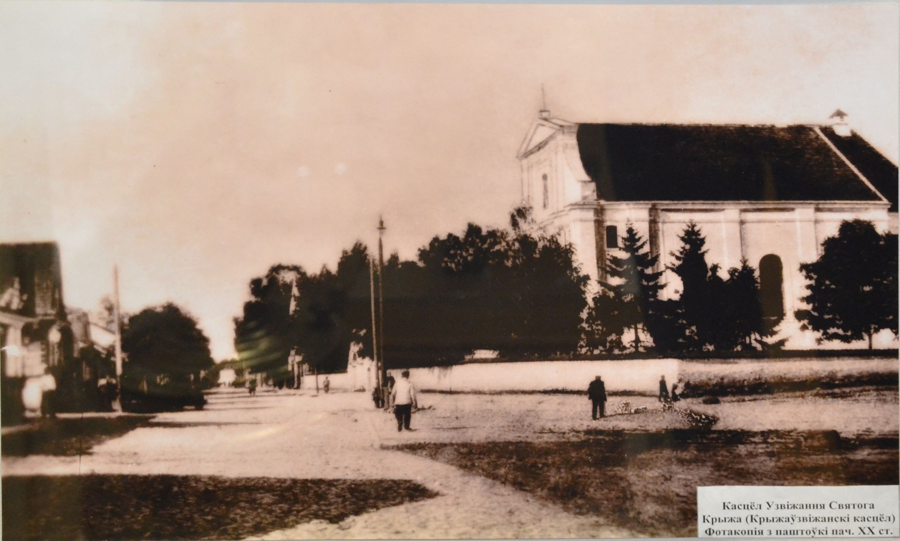 Крыстаўздвіжанскі касцёл. Фотакопія паштоўкі пач. XX ст.